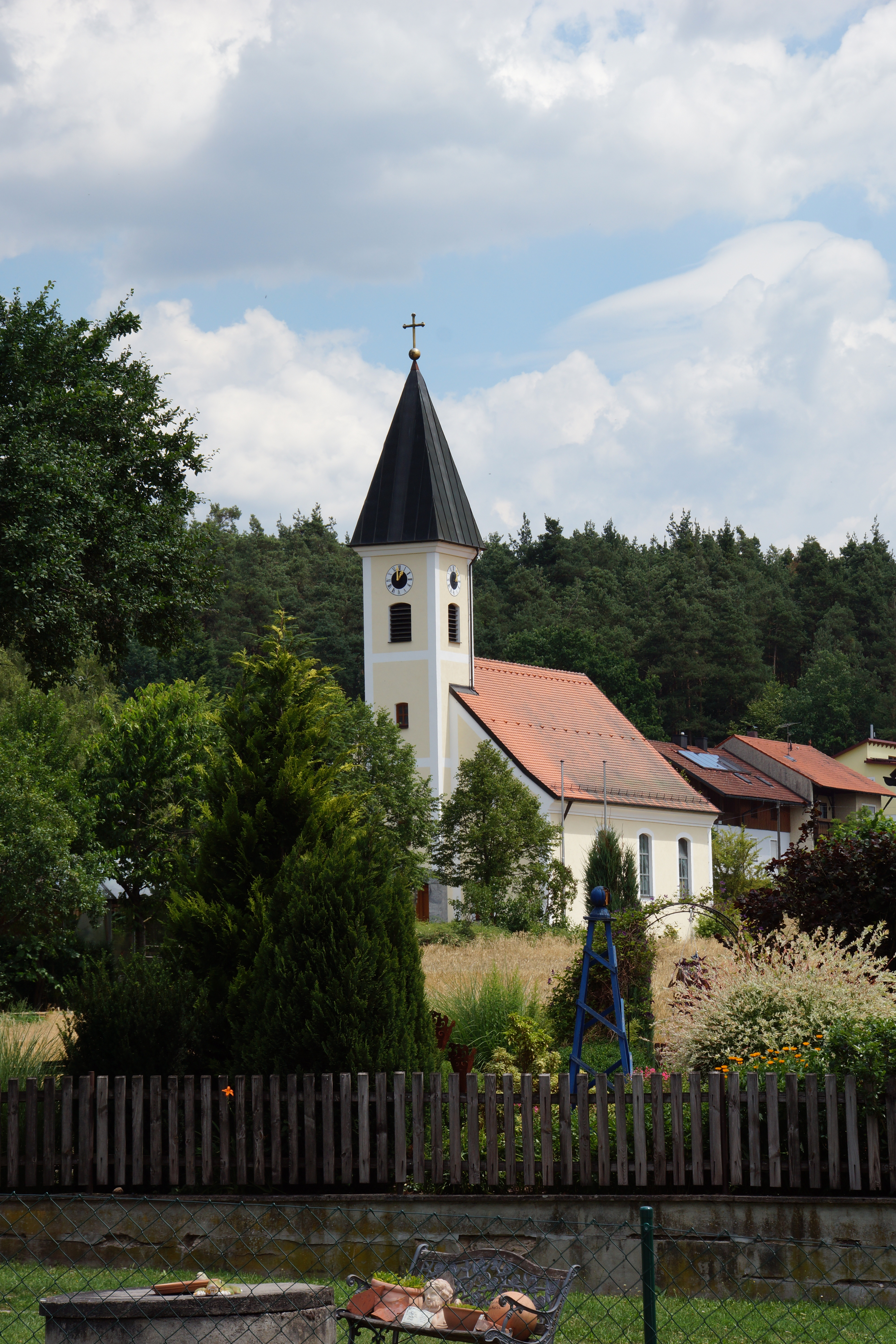 Die katholische Filialkirche St. Wolfgang in Holzhammer bei Schnaittenbach